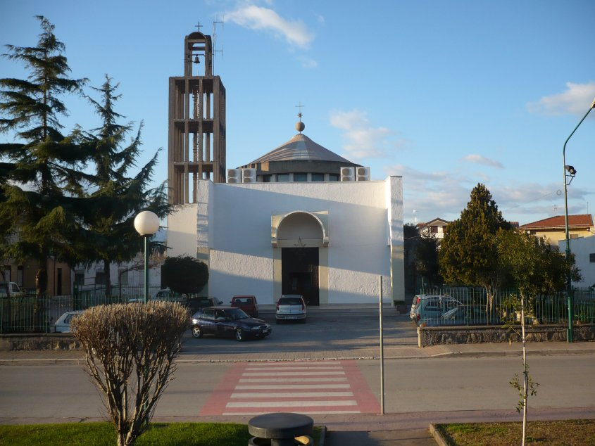 Cellole - Piazza Aldo Moro, Villa Comunale Licensing Categoria:Immagini esclusivamente in GNU FDL